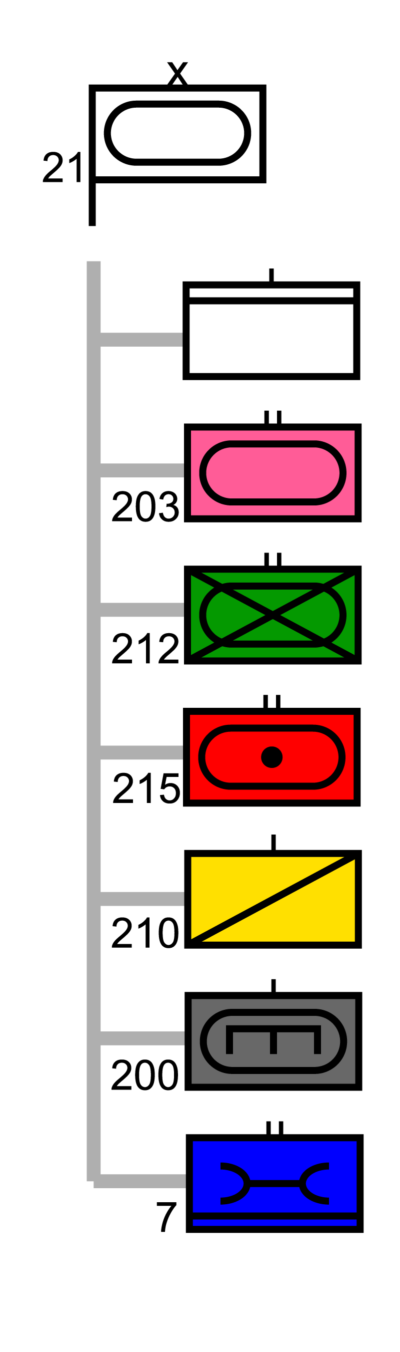 Gliederung Panzerbrigade 21 im deutschen Heeres.